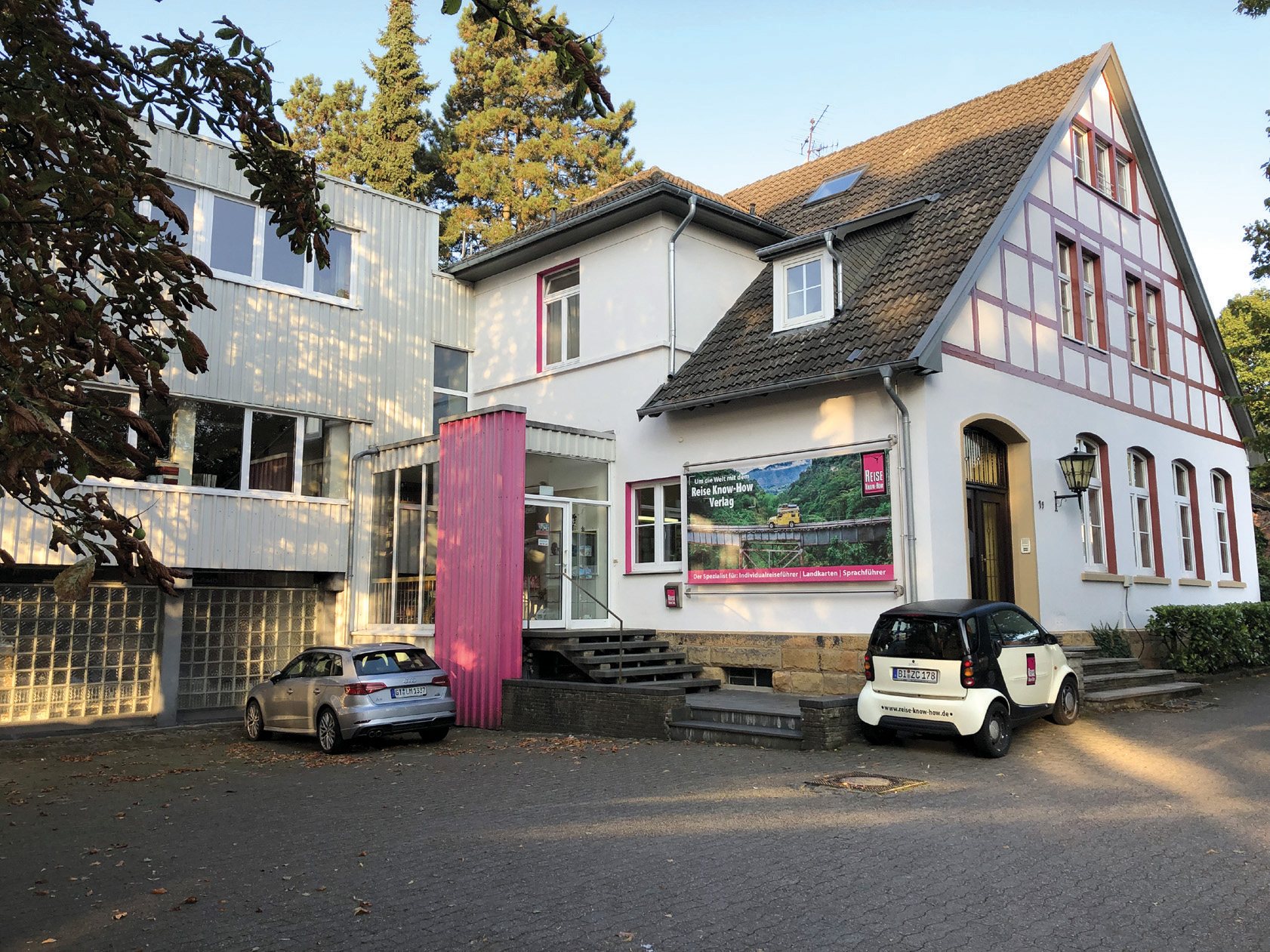 Blick auf das Verlagsgebäude des Reise Know-How Verlags Peter Rump GbmH in Bielefeld von der Einfahrt an der Osnabrücker Straße aus